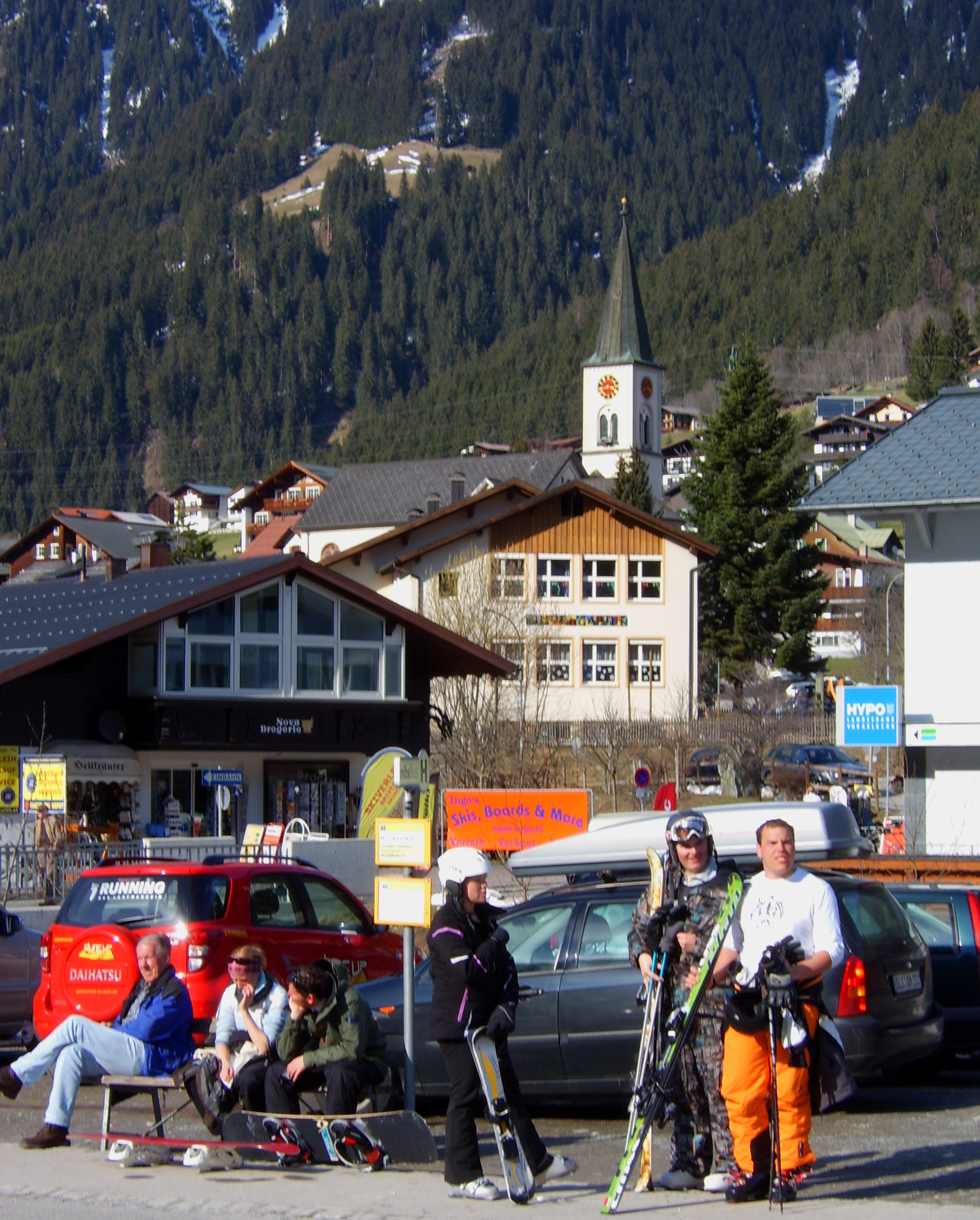 Gaschurn. Österreich, Dorfzentrum mit Kirche und Skitouristen